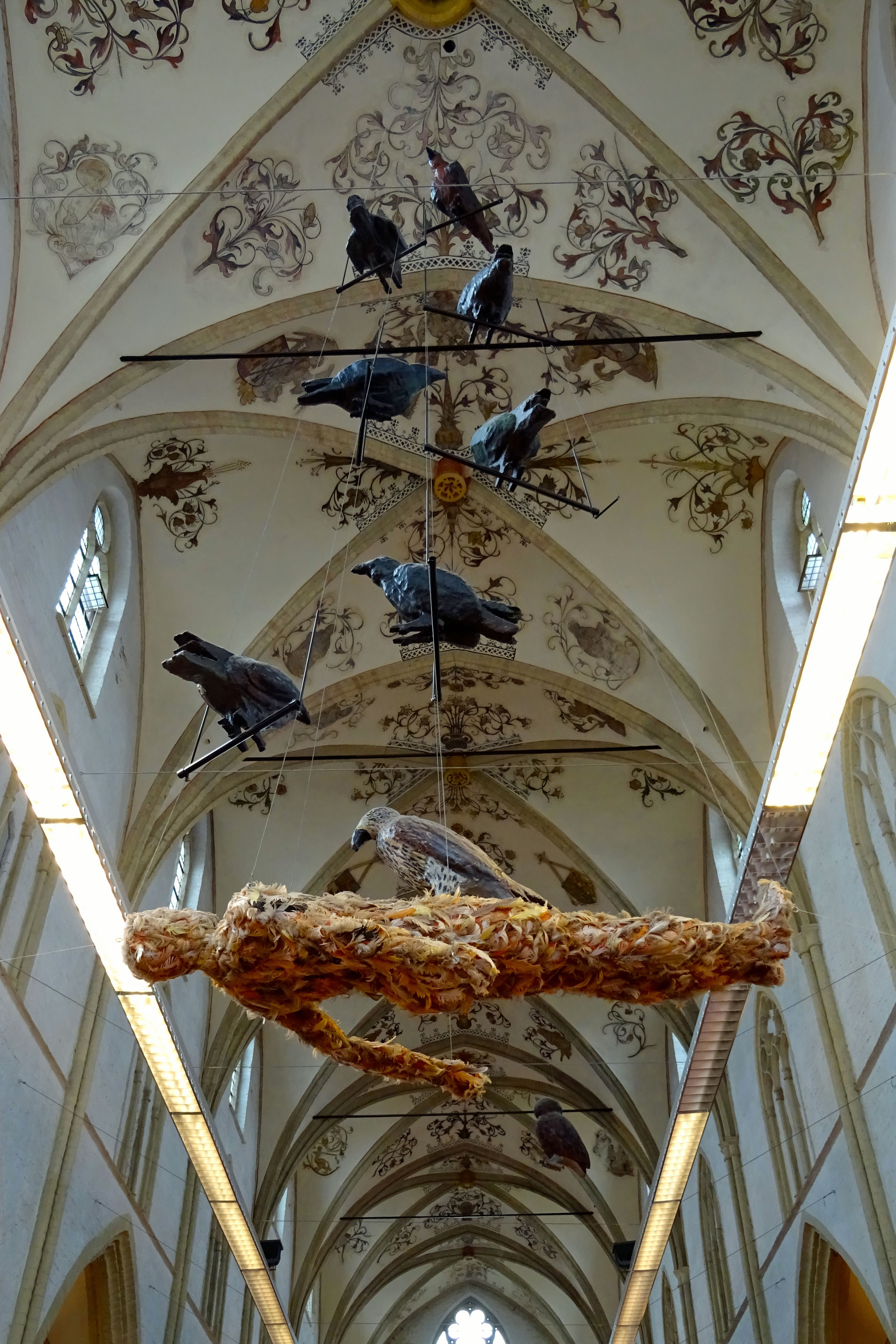 Interieur Broederenkerk in Zutphen met "Hebban Olla Vogula Nestas Higunan" kunstwerk van Lydia Schouten